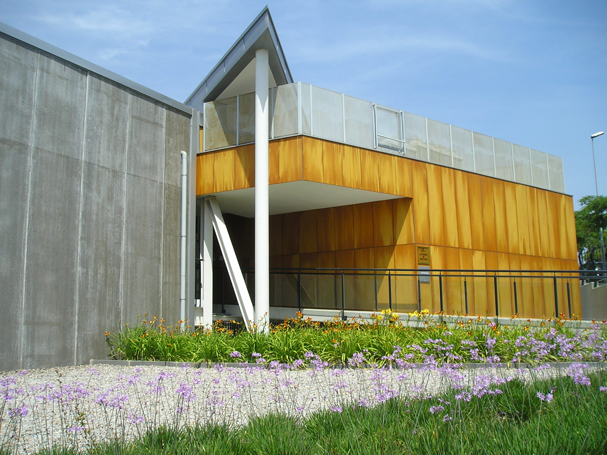 Façana principal de l'Arxiu Comarcal del Vallès Oriental (ACVO) (Granollers, Vallès Oriental).